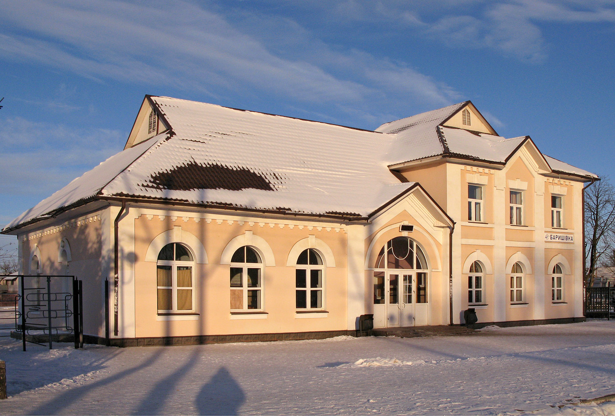 Вокзал станції Баришівка